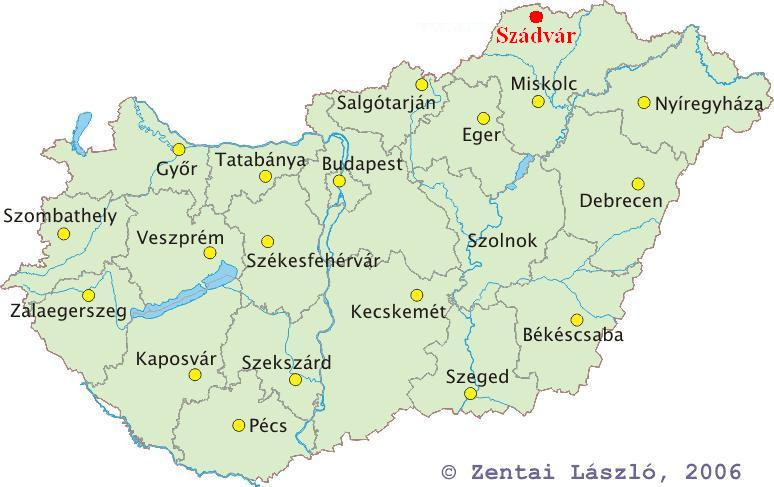 Magyarország térképe - Szádvár